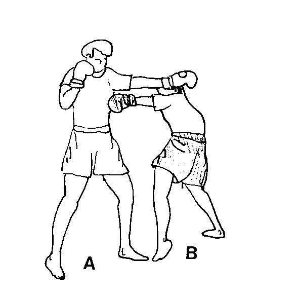 slip1.jpg